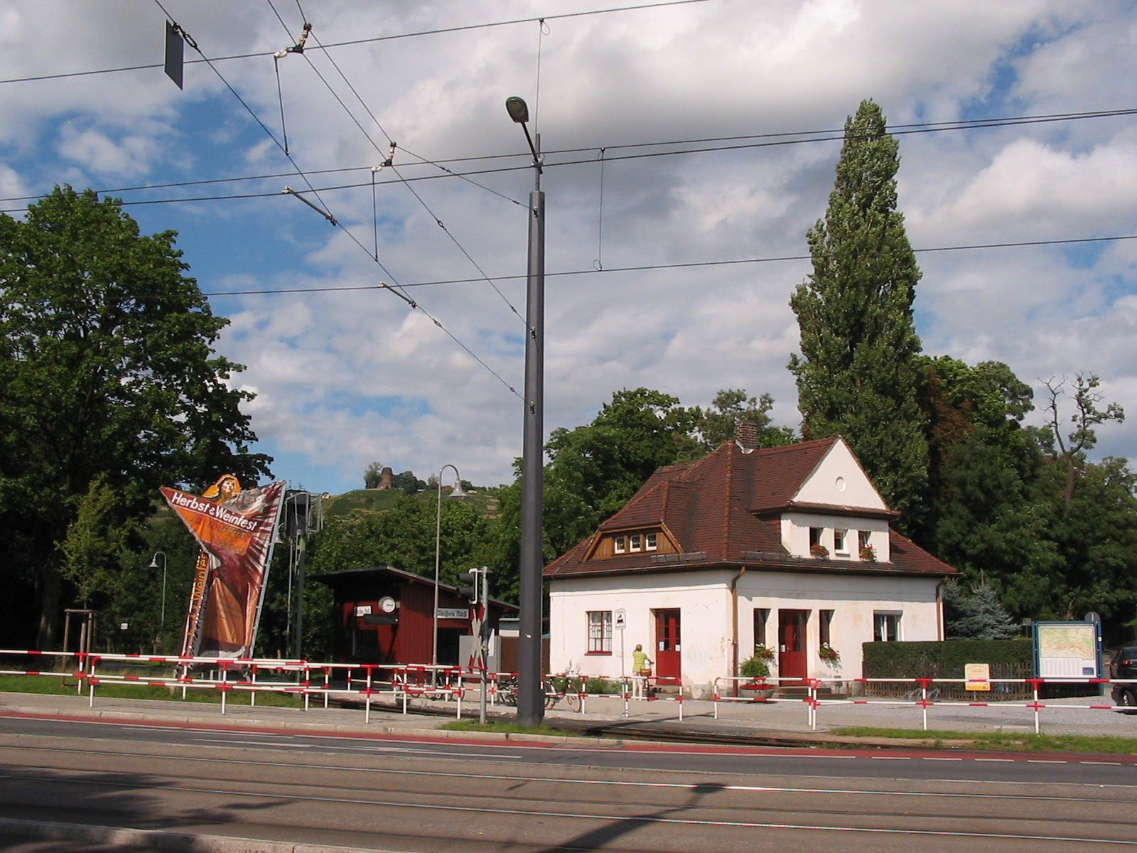 Radebeul Haltepunkt Weißes Ross